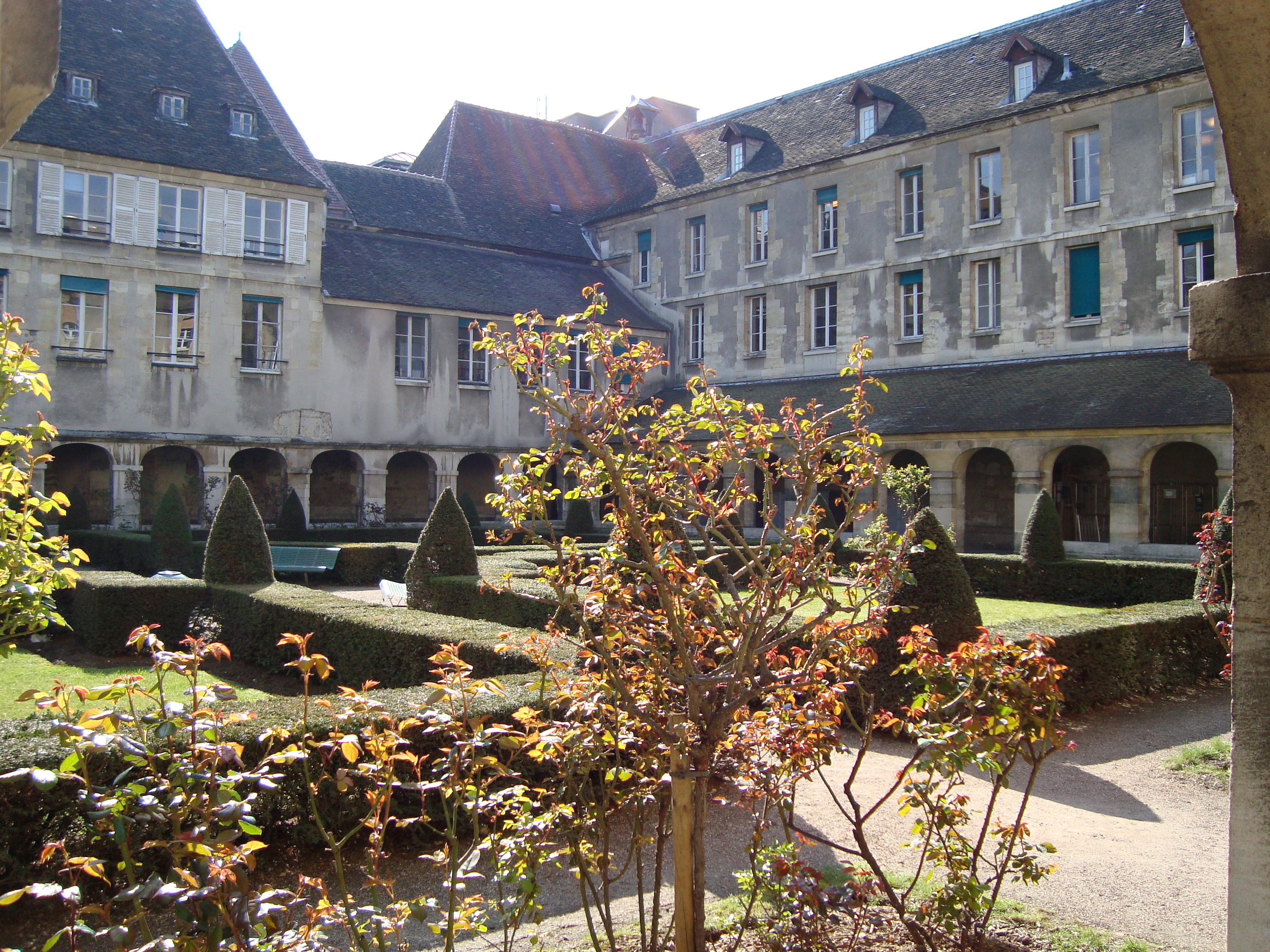 Cloître de l'ancienne abbaye de Port-Royal de Paris. Les bâtiments accueillirent dès 1814 l'établissement officiellement appelé Maison et École d'accouchement dite La Maternité de Paris ou Maternité Port-Royal. Le cloître, la chapelle et la salle capitulaire de l'ancienne abbaye sont actuellement situés dans le périmètre de la nouvelle Maternité de Port-Royal (2012), gérée par le groupe hospitalier Cochin qui dépend de l'Assistance publique - hôpitaux de Paris (AP-HP).